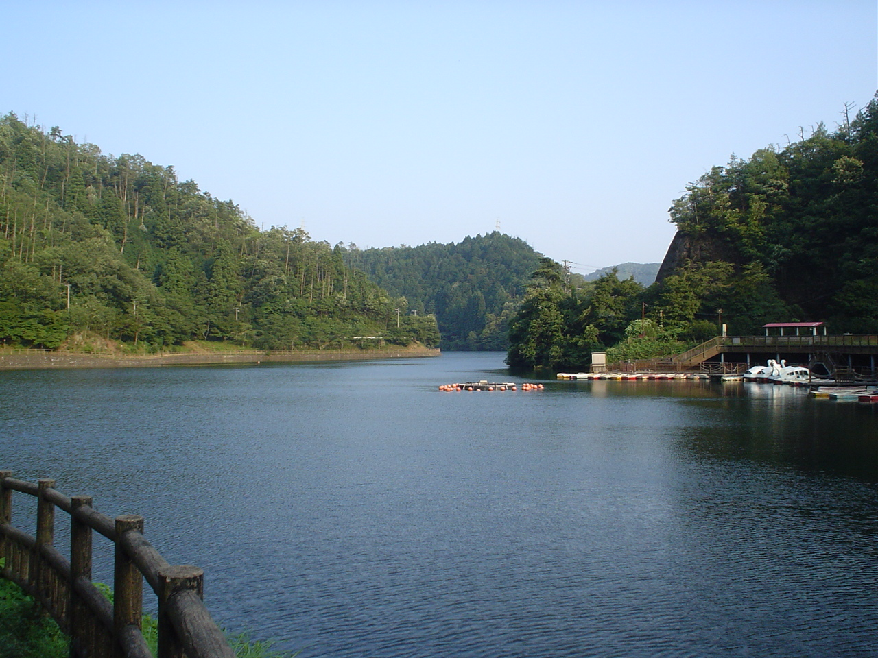 Ijira Lake, Yamagata City, Gifu Pref, Japan伊自良湖を上流から撮影（岐阜県山県市）